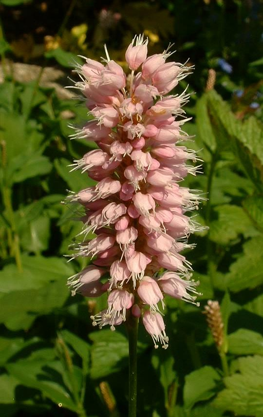 Bistorta officinalis (syn. Polygonum bistorta). Renoué bistorte, Acorus (jardin aquatique) Autoreille.